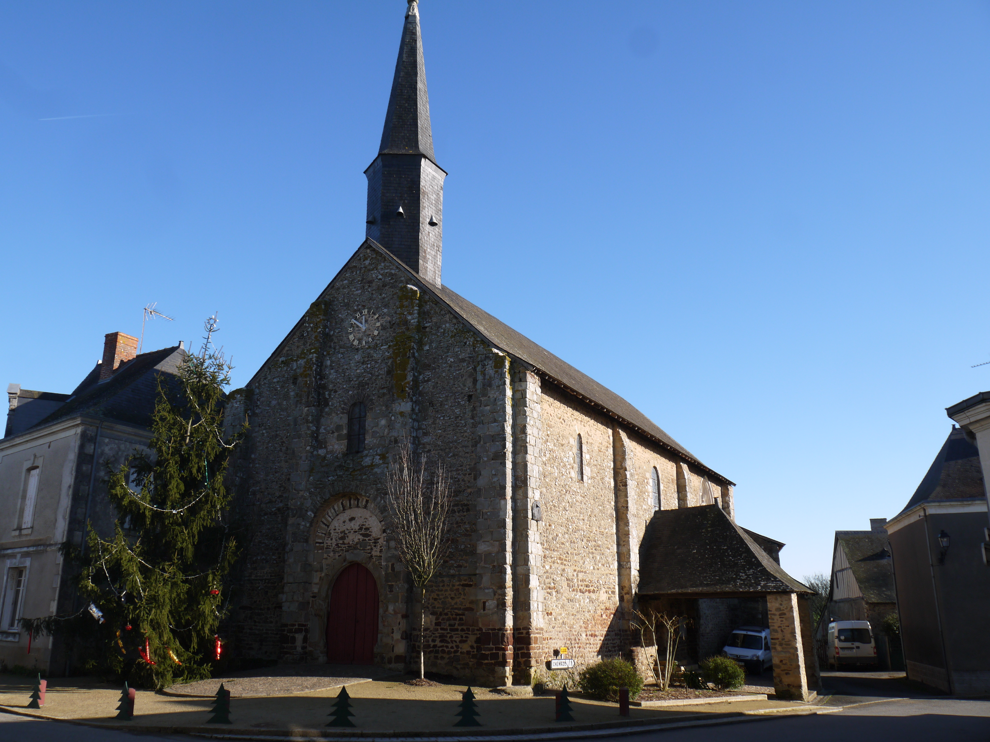 Eglise de Mée